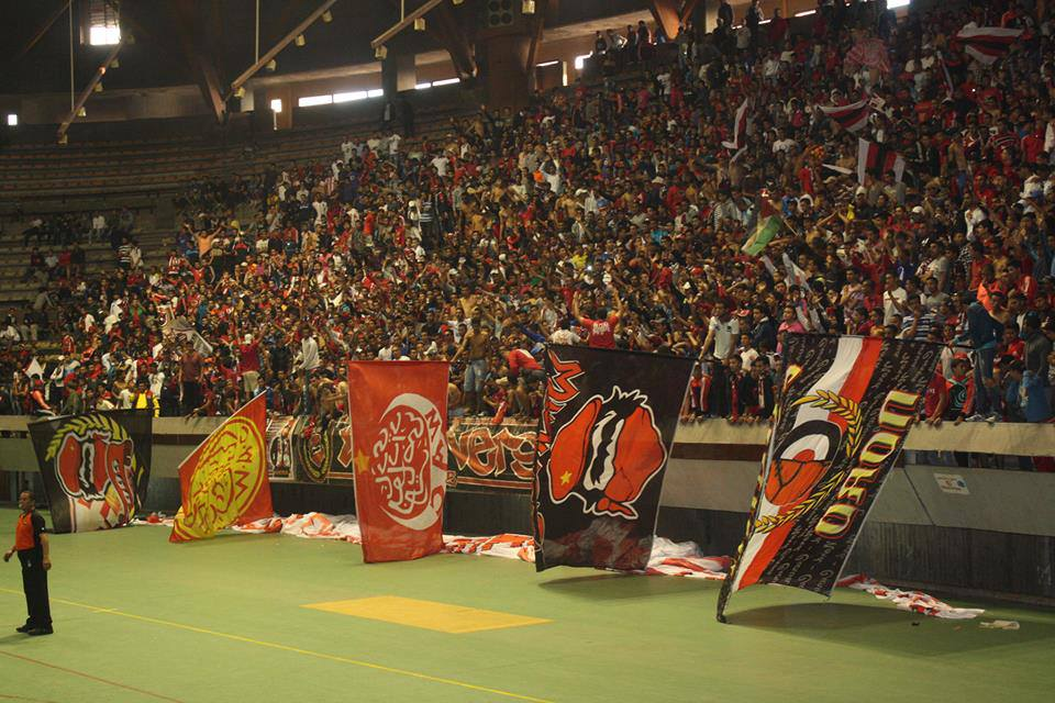 Curva Nord lors du match de championnat national de Basket face à Kenitra